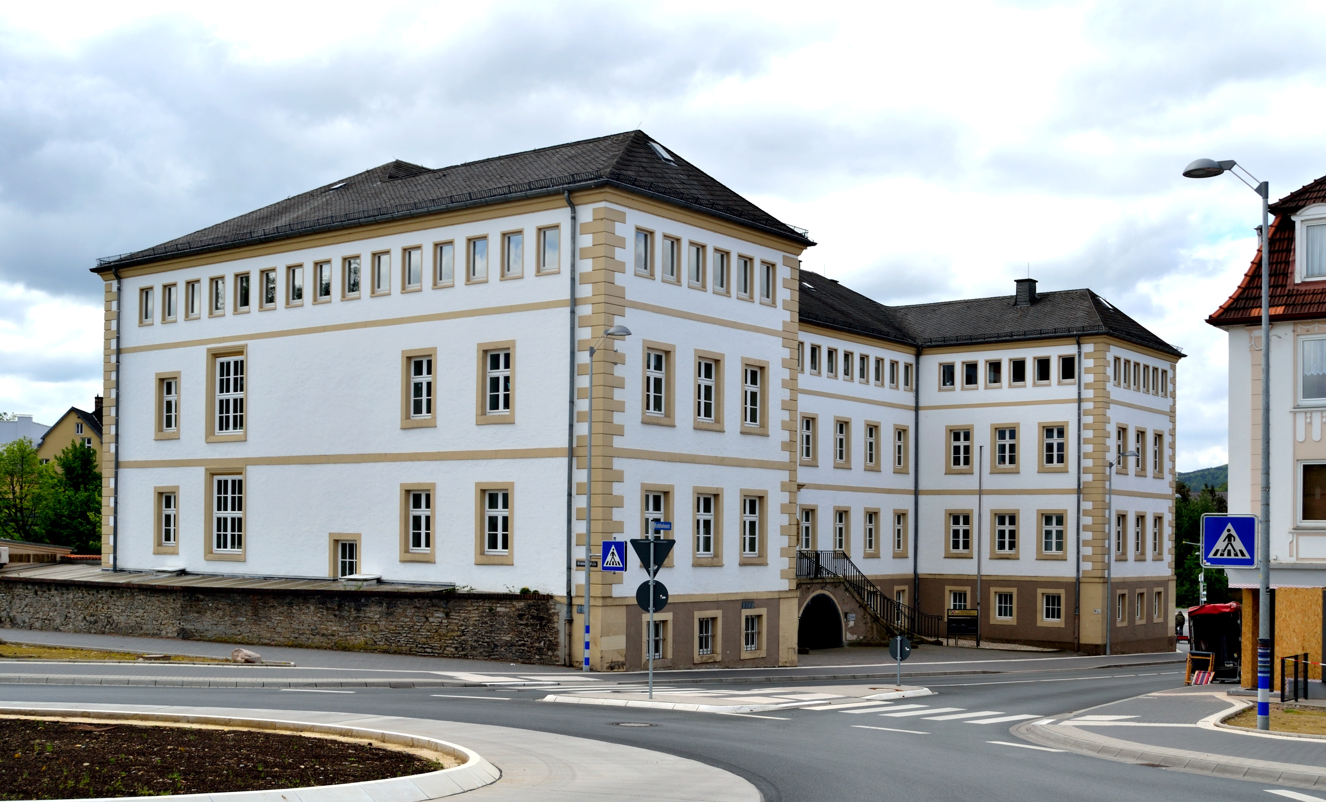 This is a photograph of an architectural monument. Behördenhaus, heute Arbeitsgericht Detmold und Sozialgericht Detmold